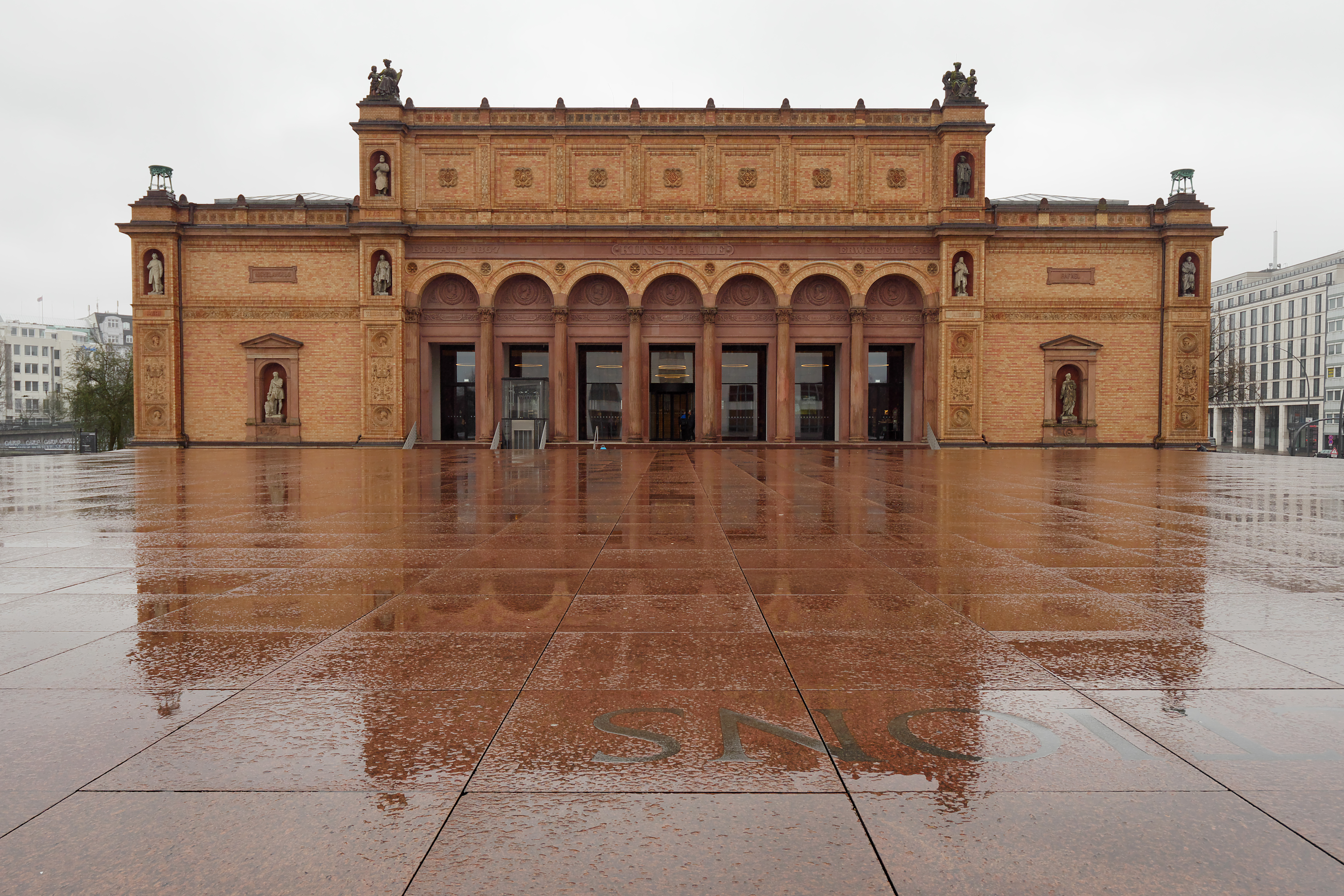 Hamburger Kunsthalle This is a photograph of an architectural monument.